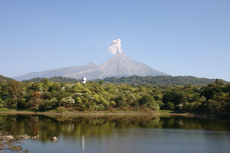 Volcan de Fuego